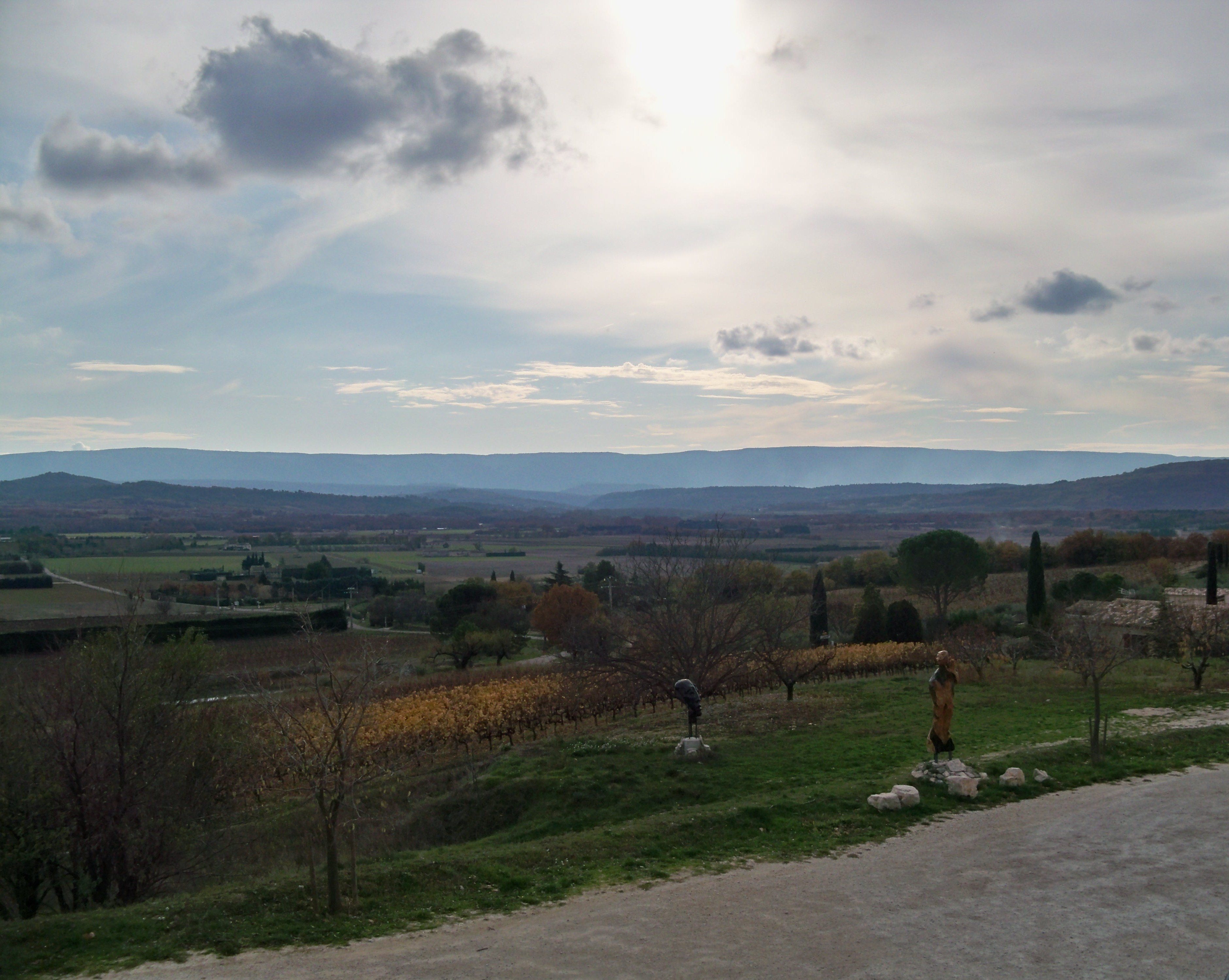 Vignes près de Jucas (84)